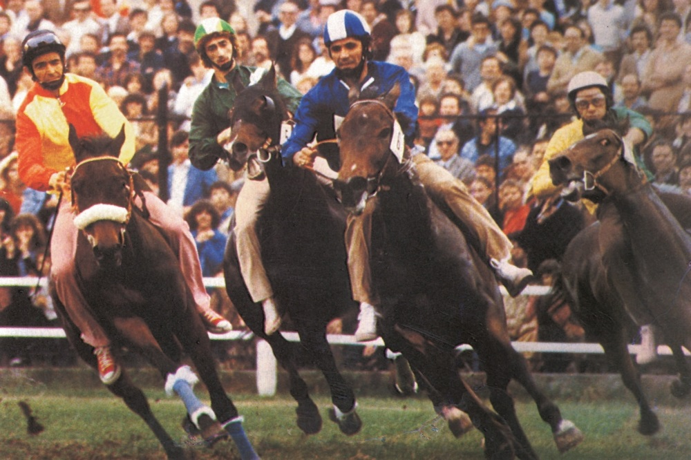 Corsa ippica del Palio di Legnano 1979.